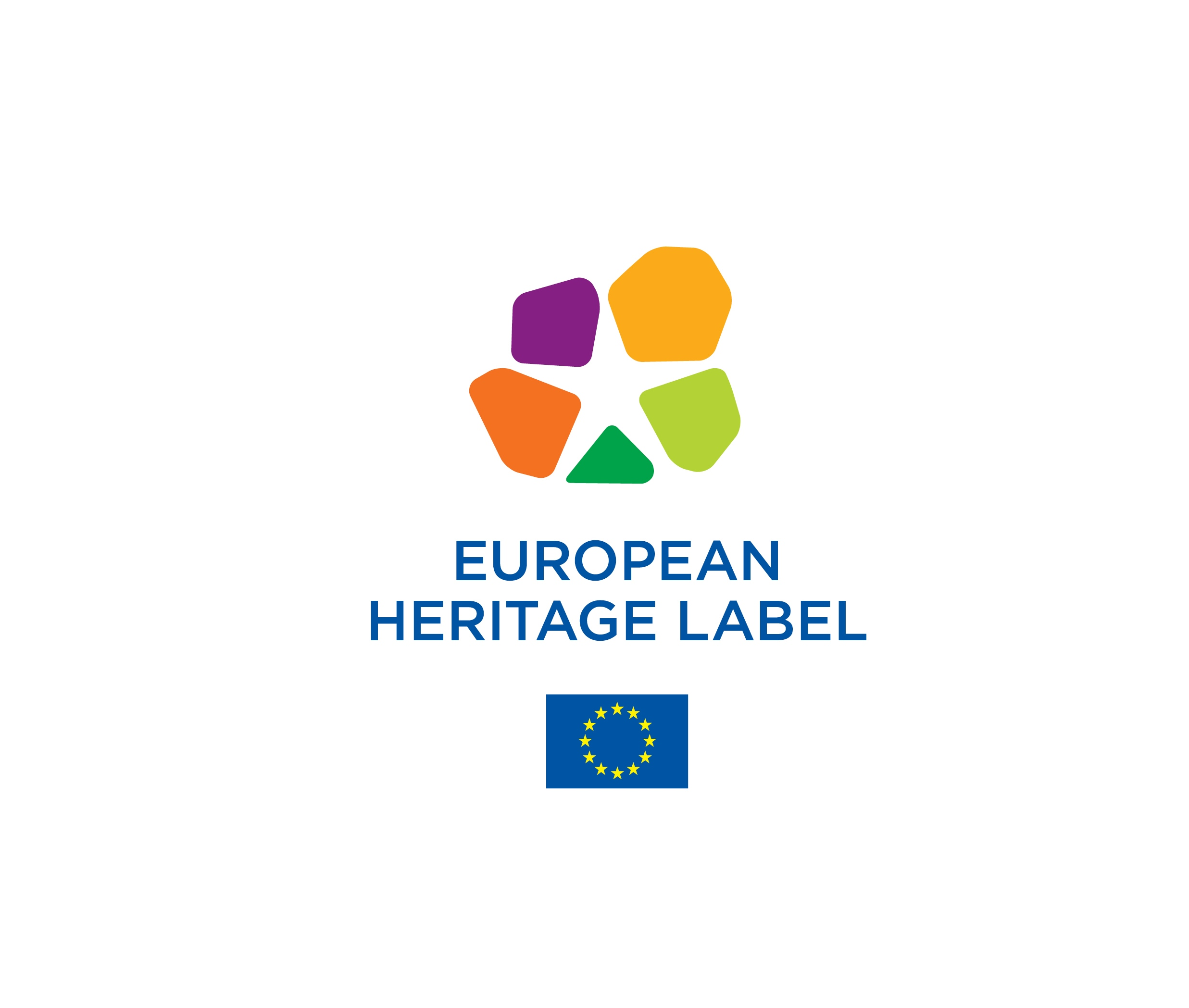 Official EHL logo